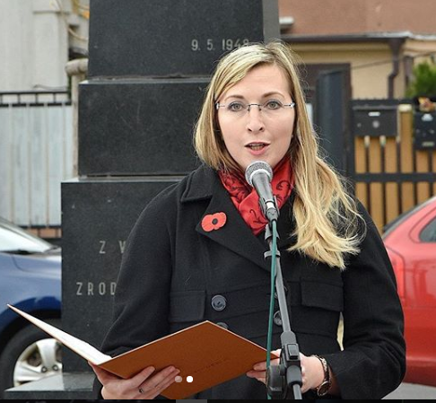 Starostka Jirkova